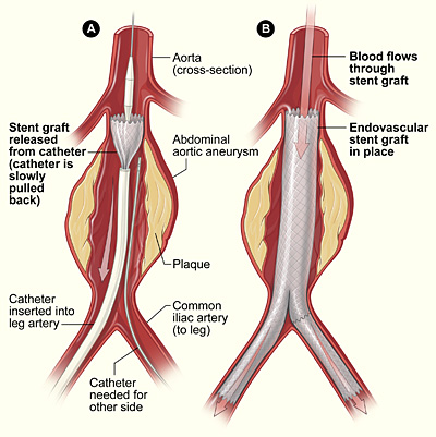 Opis slike: Endovascular Repair Izvor: Autor:en:National Institutes of Health Dozvola:work of the U.S. government Datum preuzimanja: 28. januar 2011.